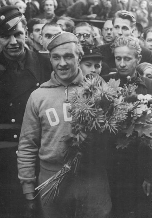 Rudi Kirchhoff Illus Illner 10.10.51 "Friedensfahrt der Nationen" durch die DDR vom 3.-14. Oktober 1951. - 5. Etappe Wittenberg-Leipzig UBz: Der Berliner Rudi Kirchhoff ging bei der 5. Etappe in Leipzig als zweiter nach Svoboda (CSR) durchs Ziel. Bildberichterstatter Gerhard Illner Leipzig N22 Pölitzstr. 20 Fernruf 592255 Verwertung der Fotos nur auf Grund der Honorarordnung des Verbandes der Deutschen Presse.